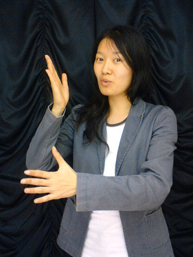 (英文名：Anna Lam)，2013年以聾人身份參與香港電台《手語隨想曲II》女主角。[1])